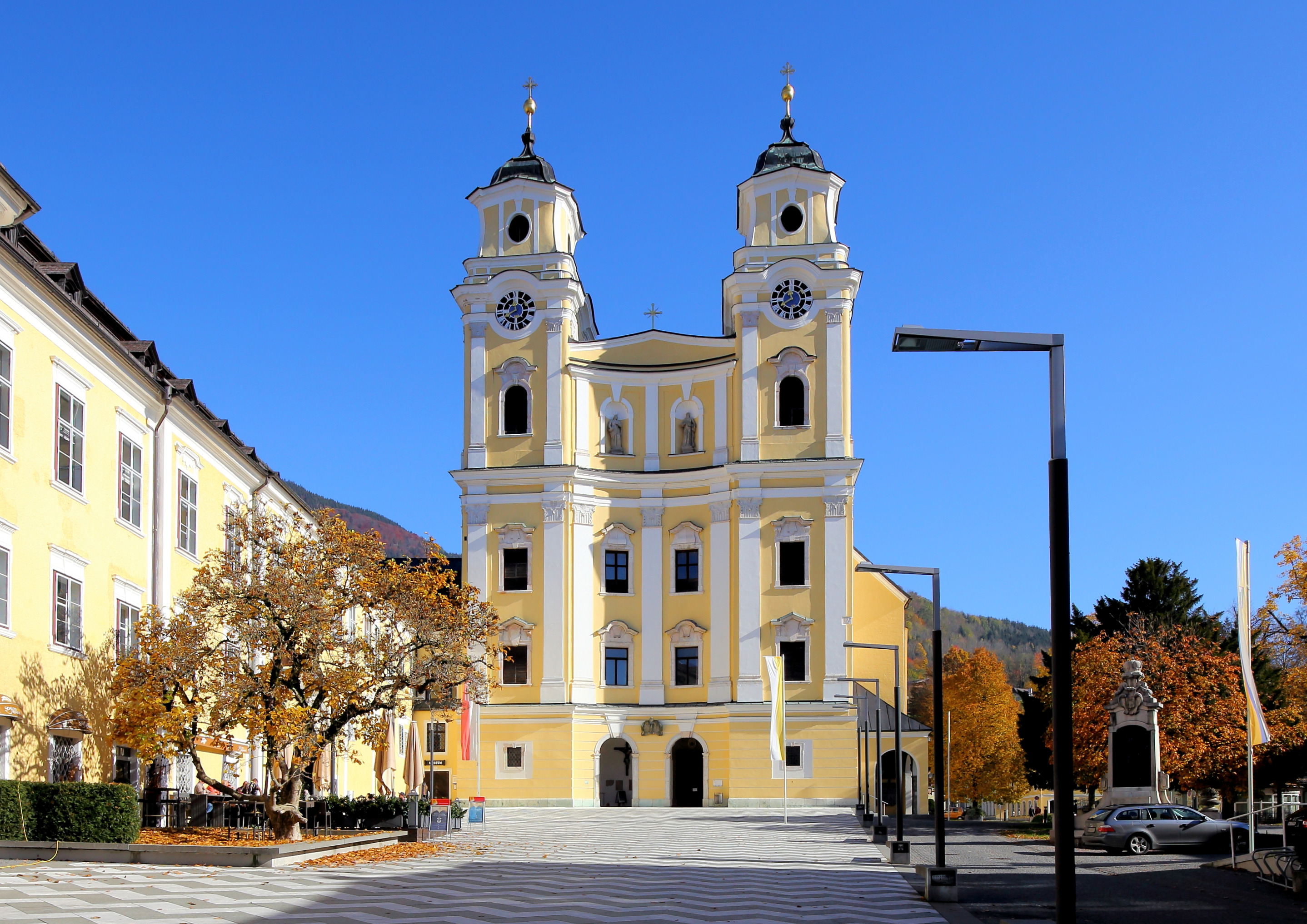 Westansicht der Basilika und ehemalige Klosterkirche in der oberösterreichischen Marktgemeinde Mondsee.Die ehemalige Klosterkirche wurde ab 1470 im gotischen Stil errichtet und 1487 geweiht. In der Mitte des 18. Jahrhunderts erfolgte eine Umgestaltung der Fassade, der Türme und des Hauptportals. Nach einem verheerenden Ortsbrand im Jahr 1774, dem unter anderem das Kirchendach zu Opfer fiel, dürften weitere Veränderungen vorgenommen worden sein. Im Jahr 1791 wurde das Kloster aufgelöst und die Kirche erhielt den Status einer Pfarrkirche; 2005 wurde sie zur Basilika Minor erhoben.